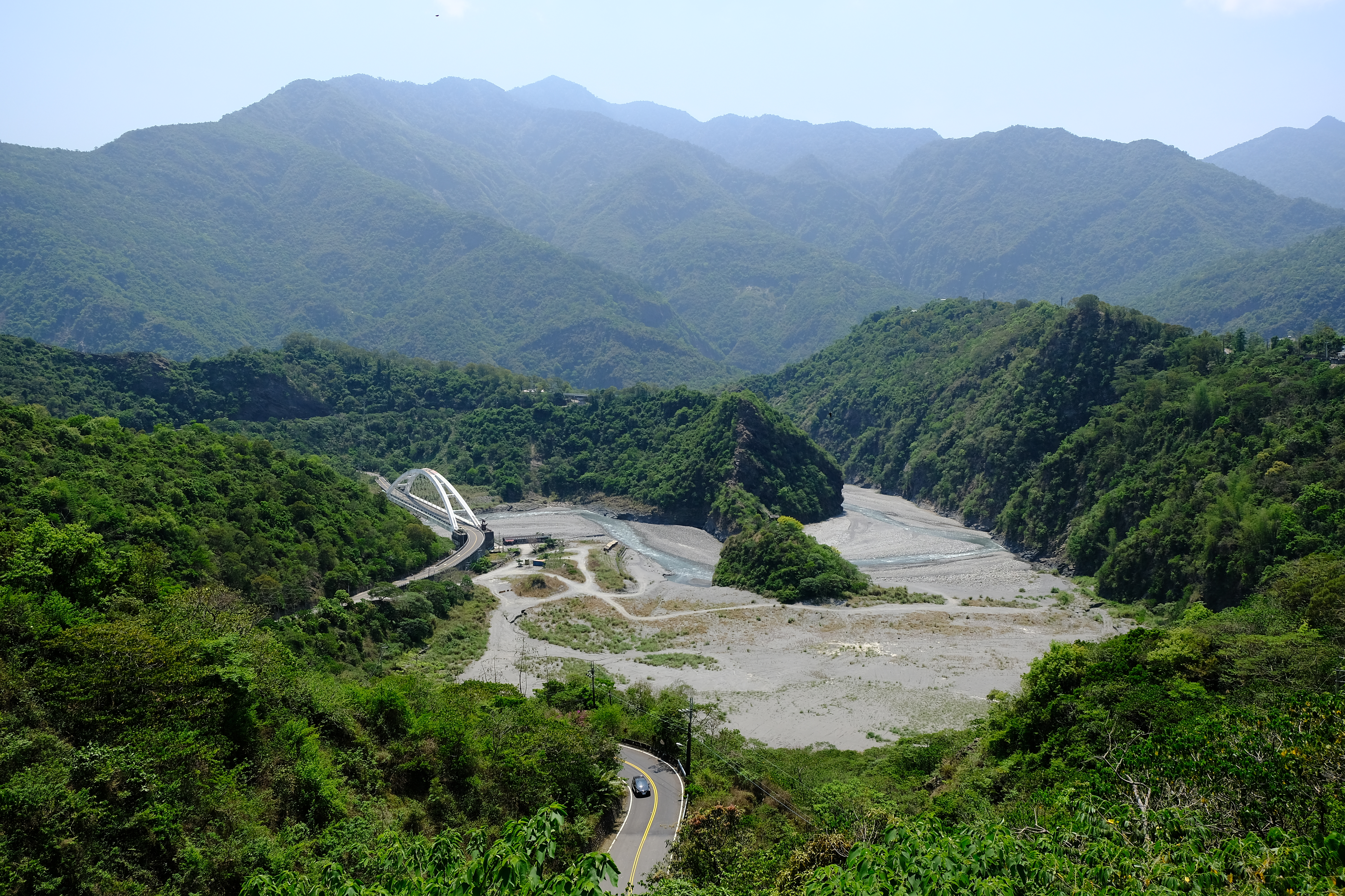 中文（台灣）: 2019 高雄市茂林區多納大橋Duona Bridge